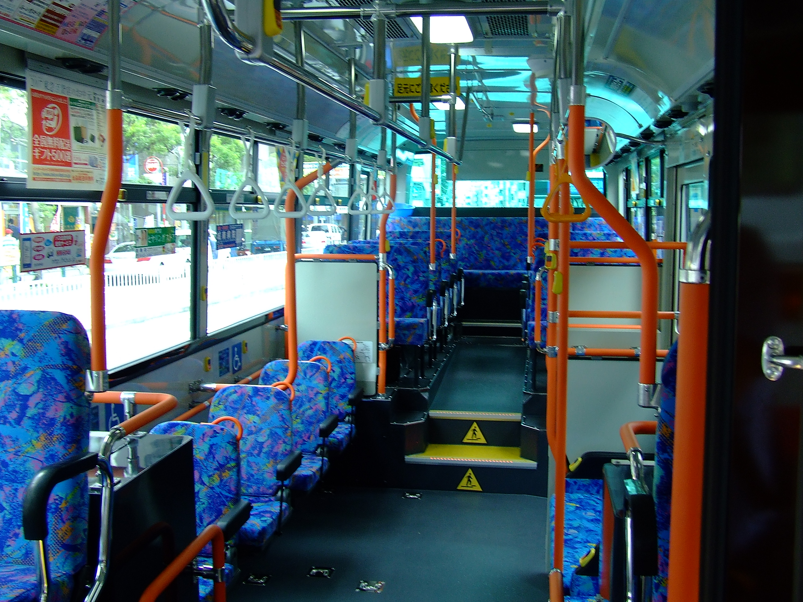 東急バス目黒営業所M8703号車（日産ディーゼルPKG-RA274KANノンステップバス）車内 目黒駅にて（折り返し待機中に乗務員に許可を得て撮影） 微妙にぶれてるので差し替え歓迎